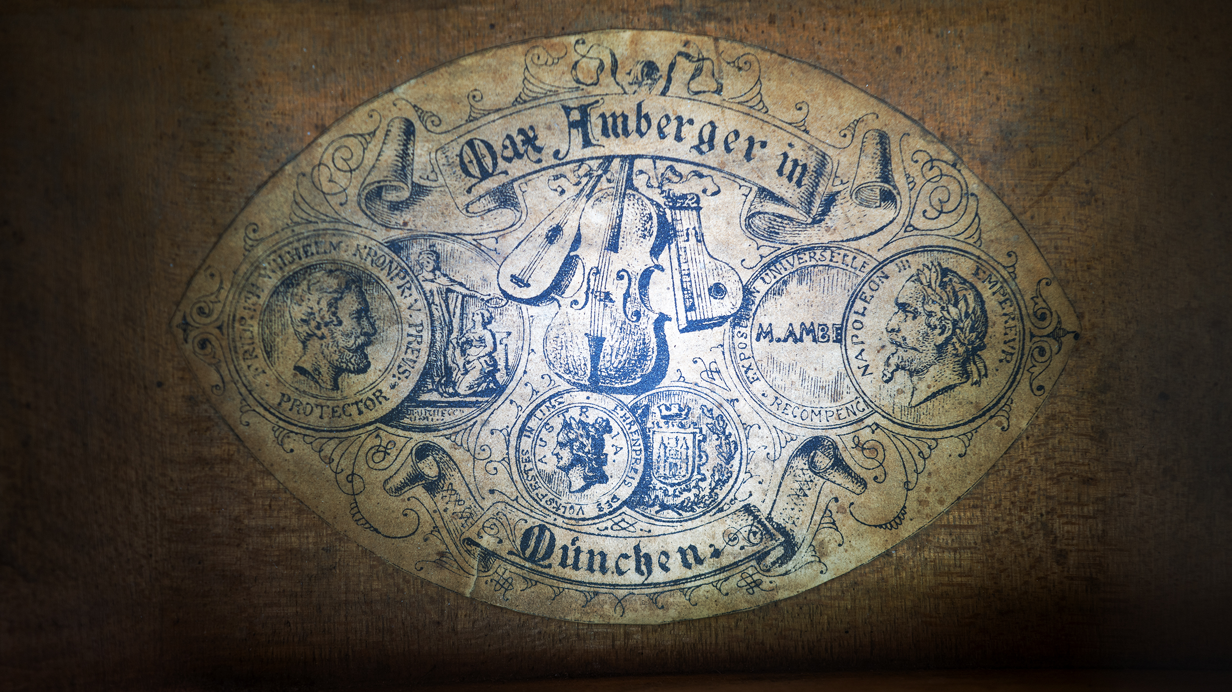 Max Amberger Label Foto: Stiftungsarchiv Hermann Hauser Guitar Foundation, 2020